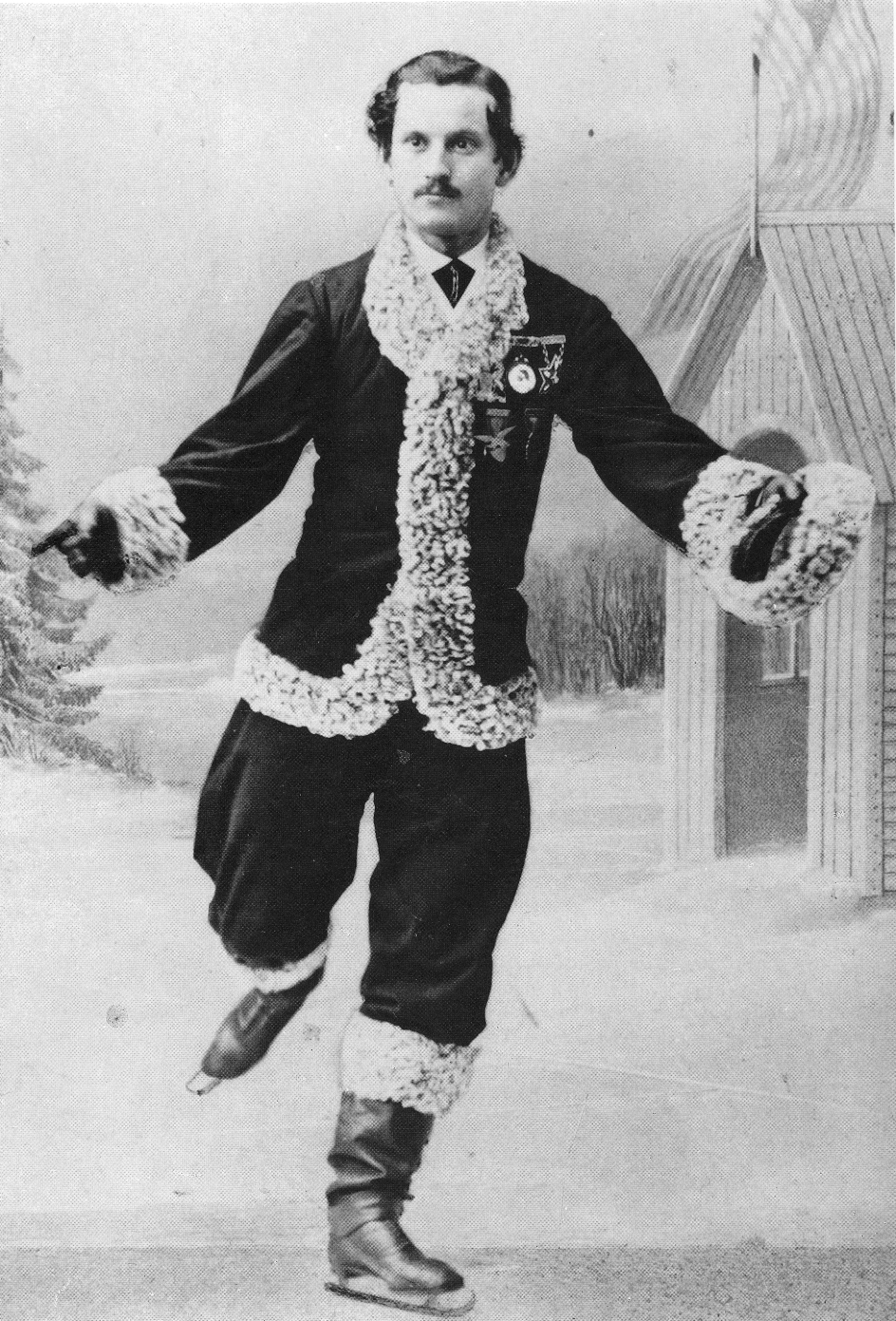 Американский фигурист Джексон Хейнс (1840-1875) -основатель фигурного катания на коньках